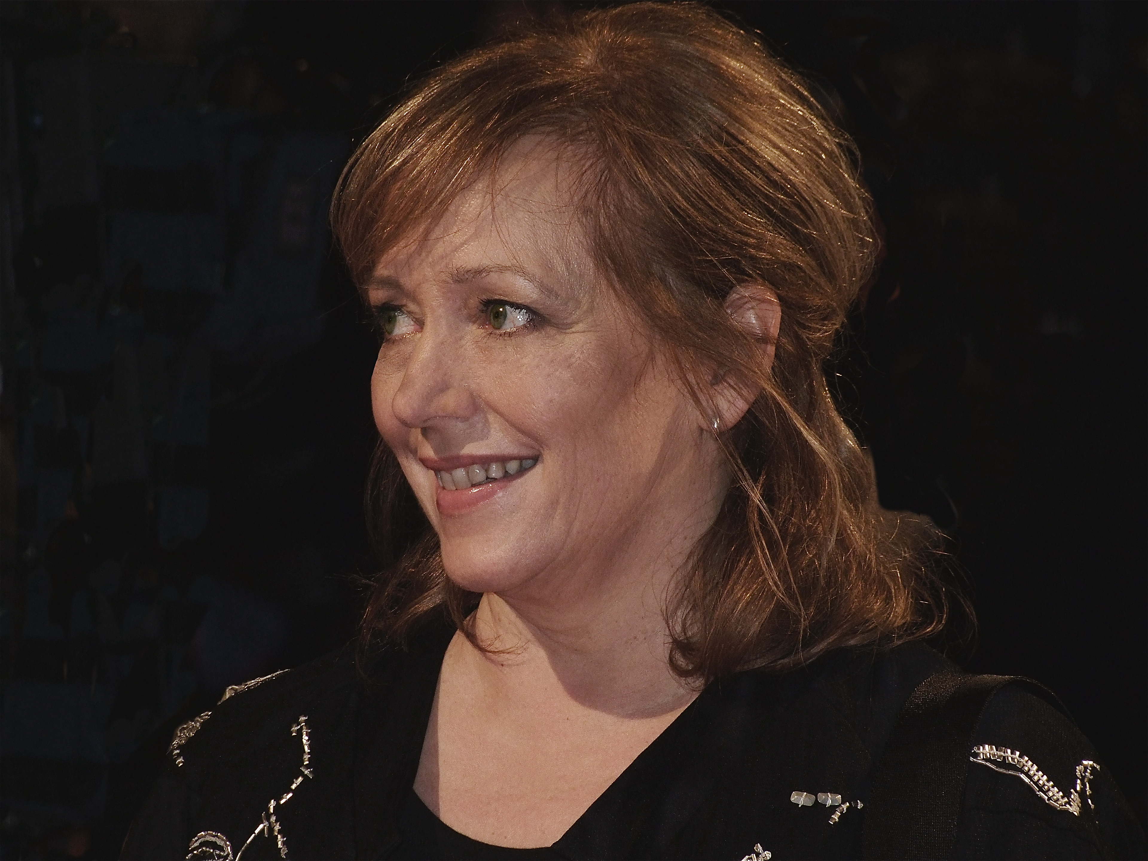 Maria C. Peters - Foto gemaakt rode loper Circustheater Scheveningen premiere Sonny Boy filmproducent, filmregisseur en scenarioschrijver